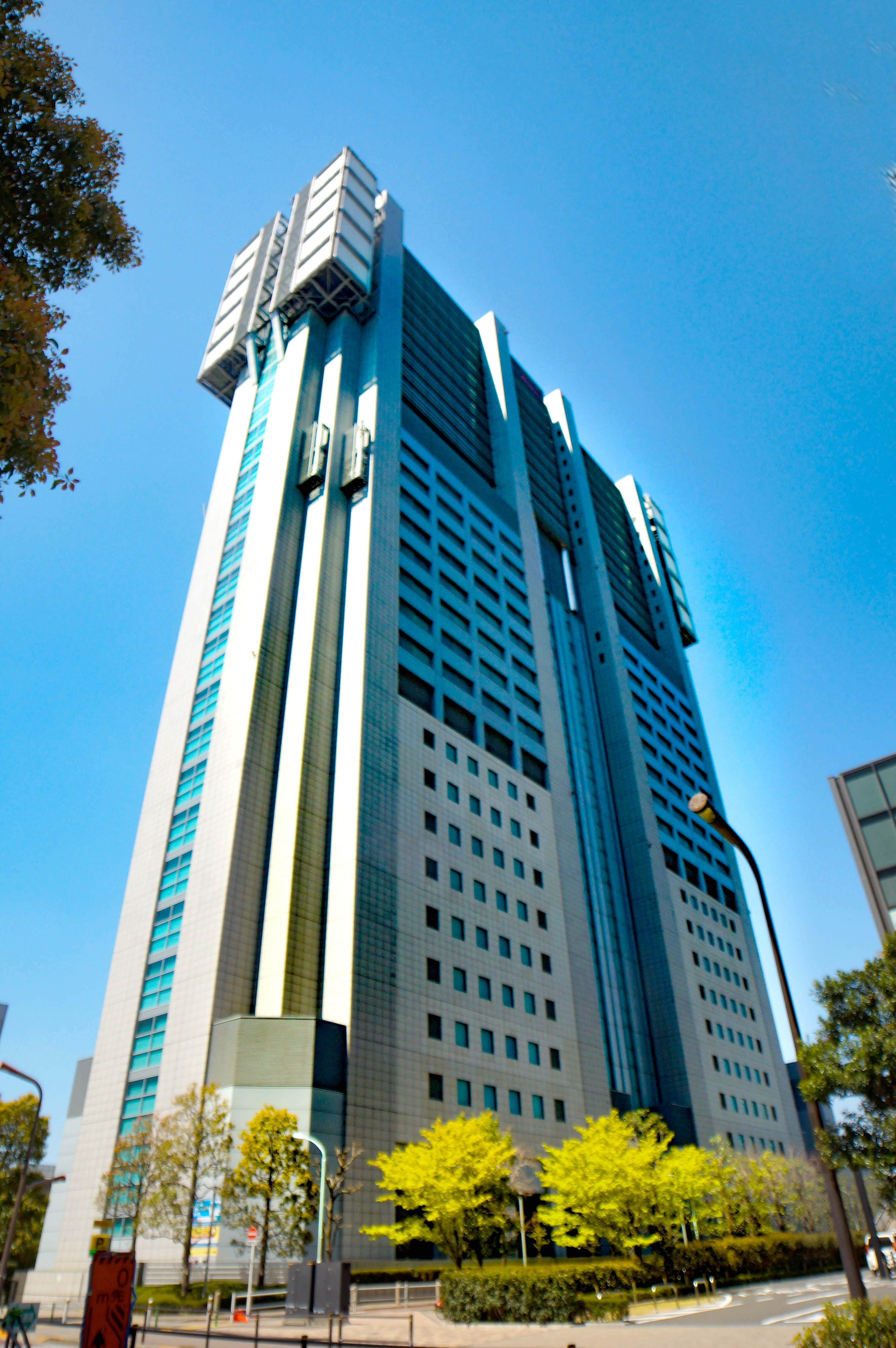 NTTドコモビル Sony SLT-A57